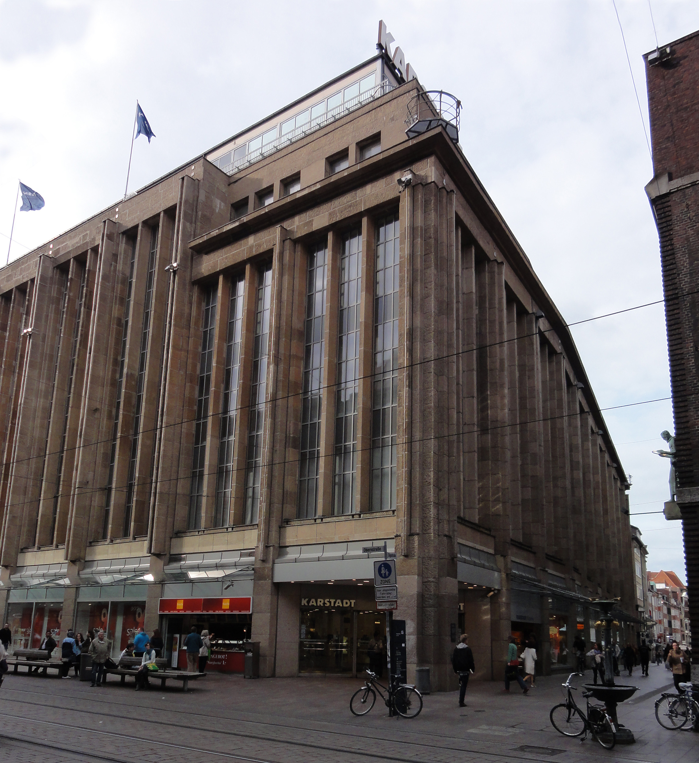 Karstadt Warenhaus in Bremen, Obernstraße 5Das abgebildete Objekt ist ein geschütztes Kulturdenkmal in der Freien Hansestadt Bremen, mit der Nr. 1887 beim Landesamt für Denkmalpflege registriert.